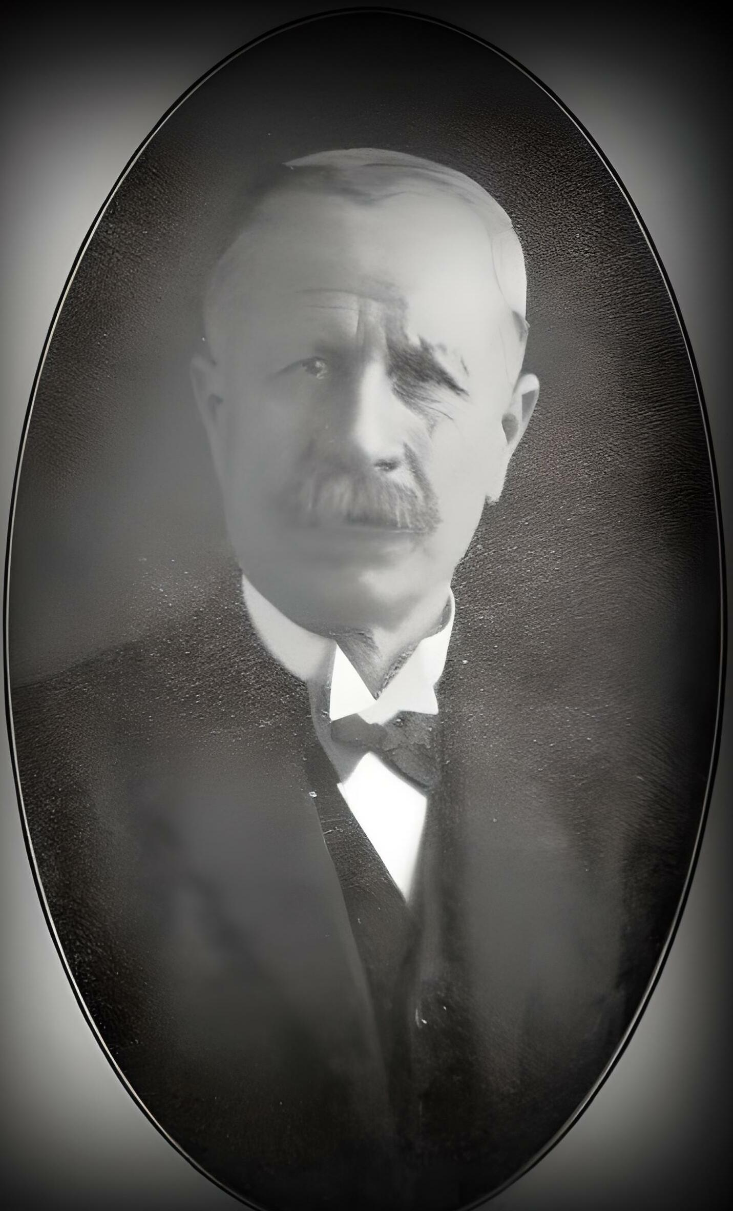 Foto do patriarca da família Jafet